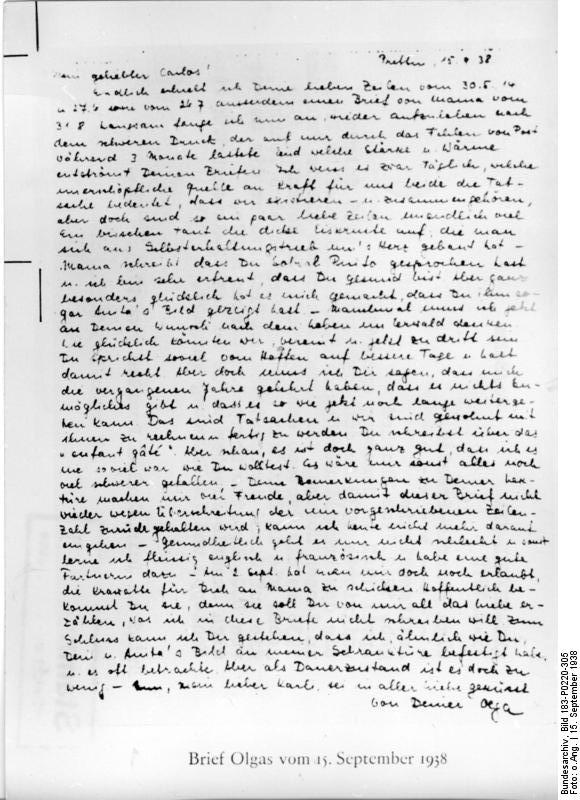 ADN-ZB/IML-ZPA, 19.2.1975, Olga Benario-Prestes, Antifaschistin geb. 12.2.1908 München April 1942 in Bernburg ermordet, emigrierte 1933 in die Sowjetunion; 1935 folgte sie dem brasilianischen KP-Führer Luis Carlos Prestes in dessen Heimat. Von Brasilien wurde sie im Frühjahr 1936 an die Gestapo ausgeliefert. Im November 1936 gebar sie im Berliner Frauengefängnis eine Tochter, die auf Grund internationaler Proteste an die Mutter von L.C. Prestes übergeben werden mußte. Olga Benario-Prestes wurde in das KZ-Ravensbrück verschleppt und in Bernburg vergast. Brief an Luis Carlos Prestes vom 15.9.1938